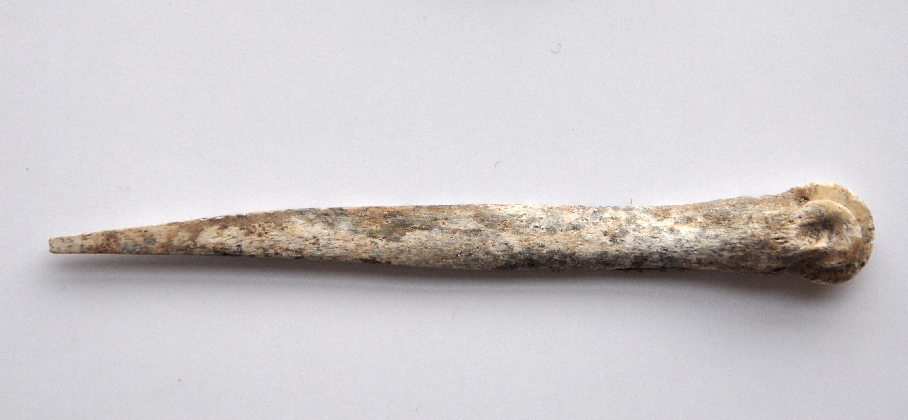 Steinplattengrab (erste Hälfte 3. Jahrtausend v.Chr.) einer etwa 35-jährigen Frau in Kempraten (Switzerland) : Beigaben in Form von drei Bären- und zwei Hunde-Eckzähnen, vier Schalen von Meermuscheln (alle durchlocht, vermutlich gehörten sie zu einer Kette) sowie eine Ahle aus Knochen